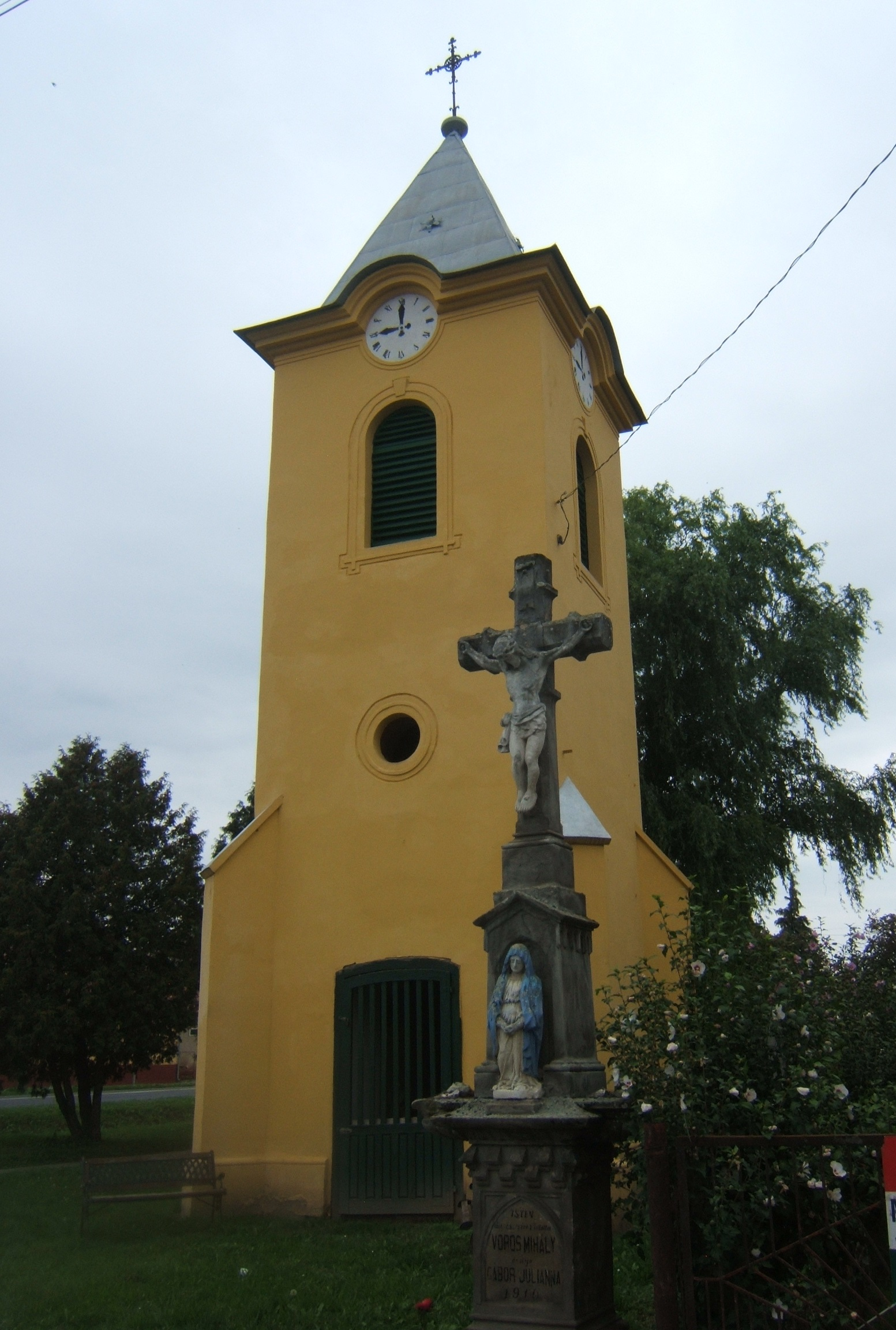 Műemlék barokk, harangtorony Böhönyén (az 1700-as évekből) Azonosító: 7827, törzsszám: 4509, előtte 1910-ből származó kőkereszt ID 19509 This is a photo of a monument in Hungary, Identifier: 7827 This is a photo of a monument in Hungary, Identifier: 19509